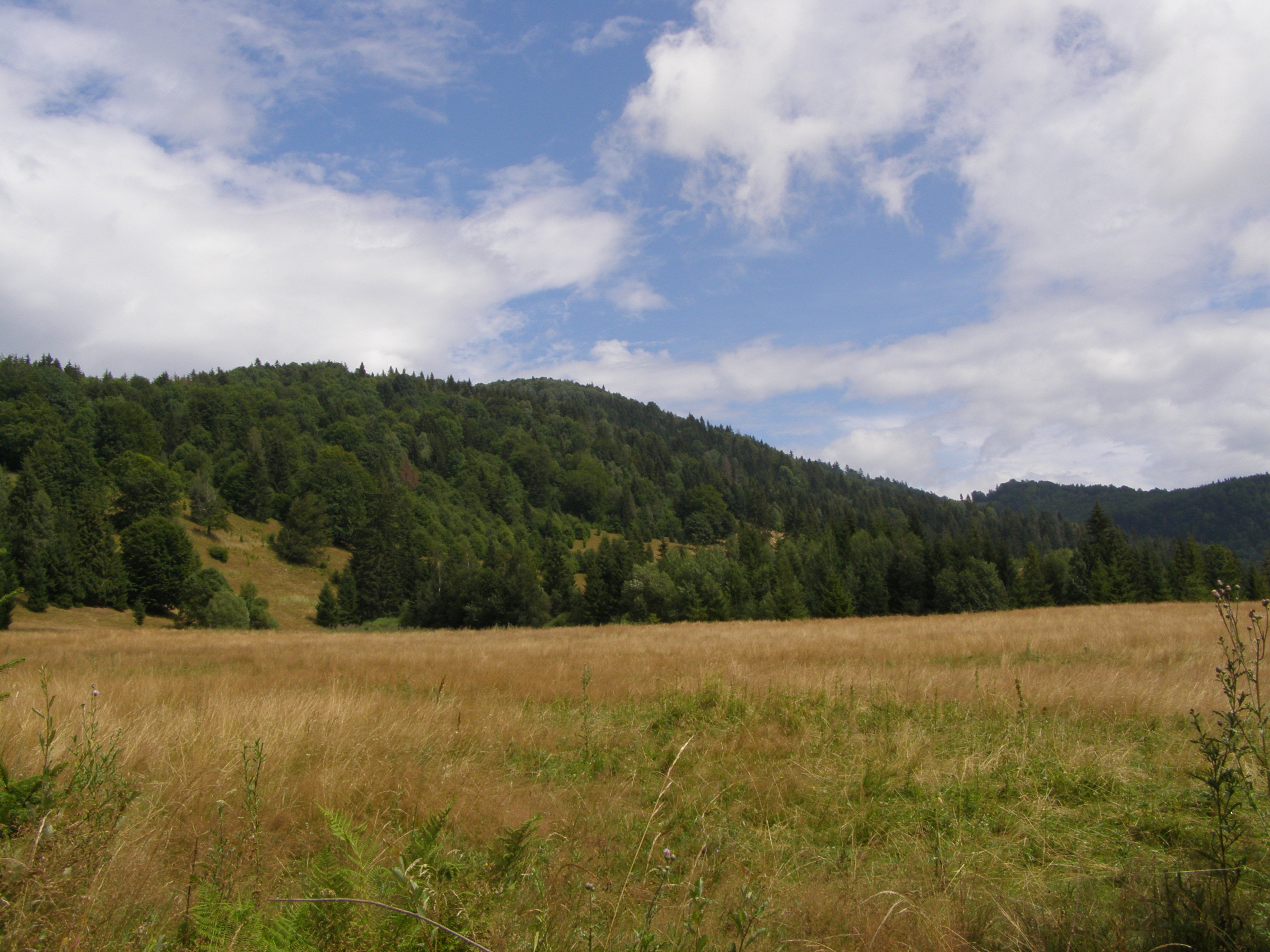 Česky: Slovenské rudohoří, Veporské vrchy, Fabova hoľa, pohled vedlejší vrchol kopce Kučalach od západu